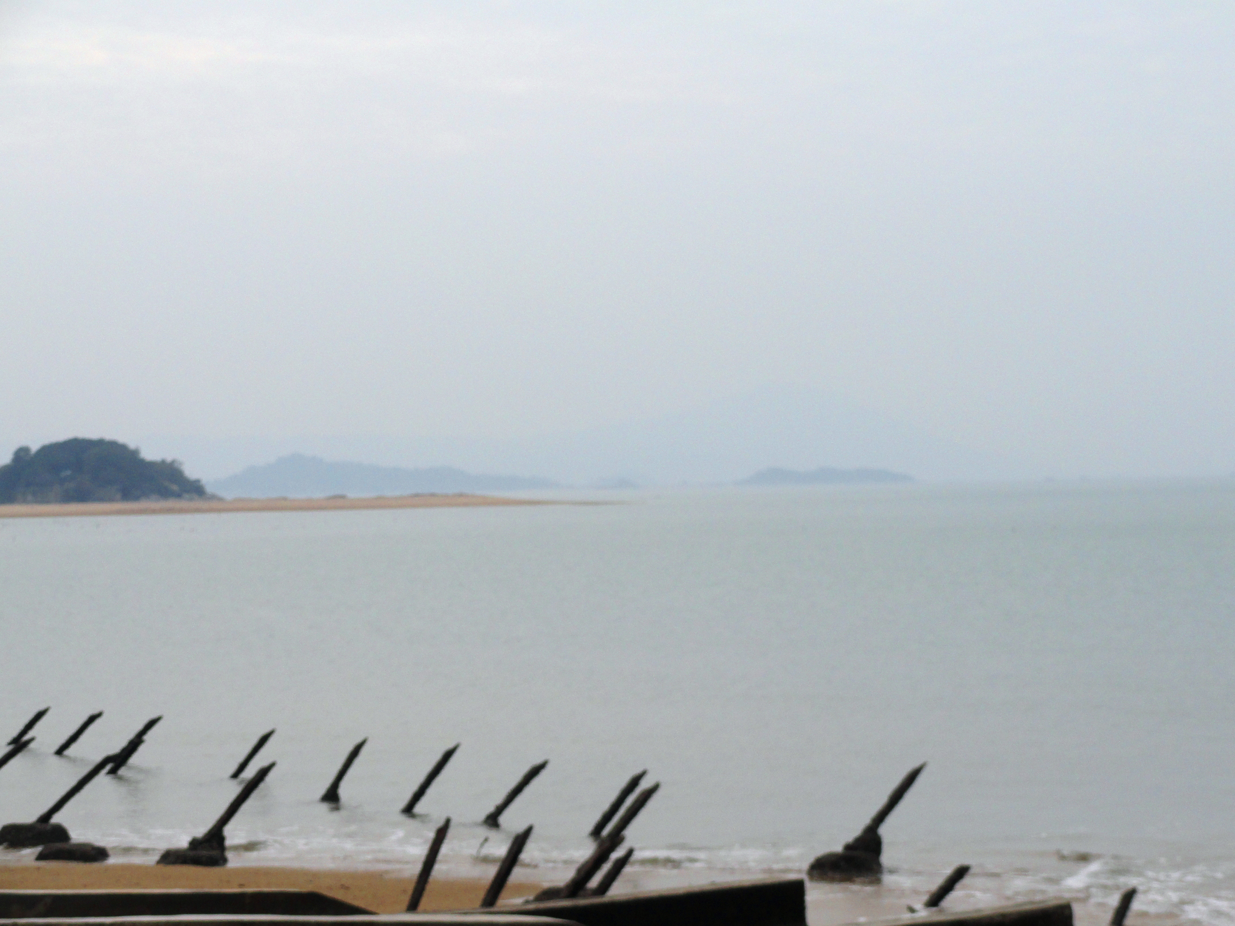 在金門烈嶼鄉看到的大膽、二膽島。中文（中国大陆）: 在金门烈屿乡看到的大胆、二胆岛。